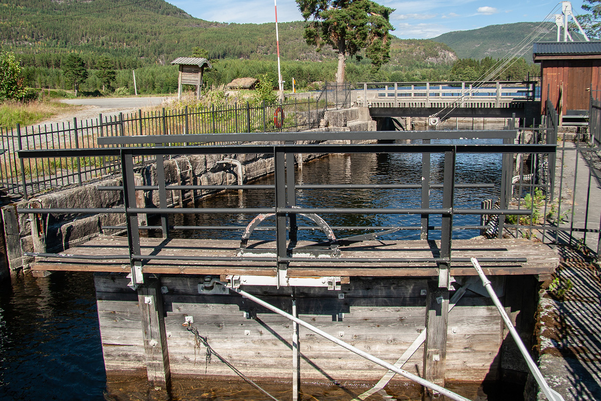 Storstraum sluse fra 1914.